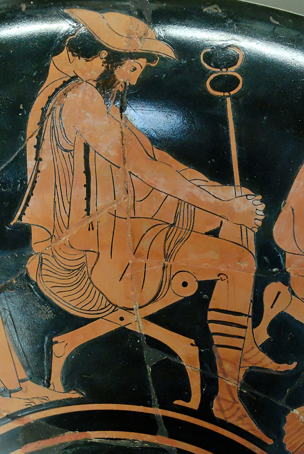 Hermes. Detalhe de vaso ático proveniente de Vulci, representando a embaixada de Odisseu a Aquiles.